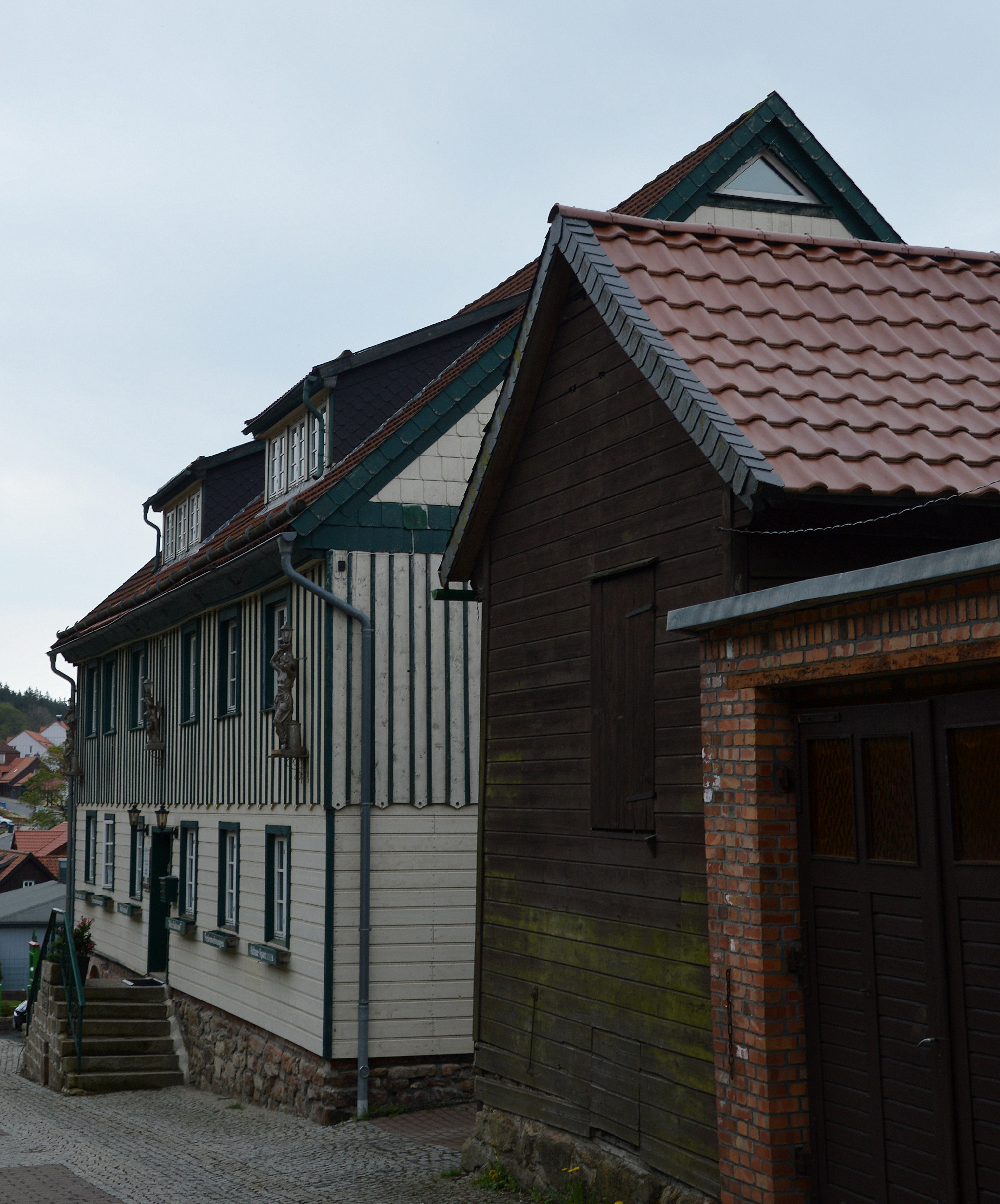 Kirchberg 3 in Schierke